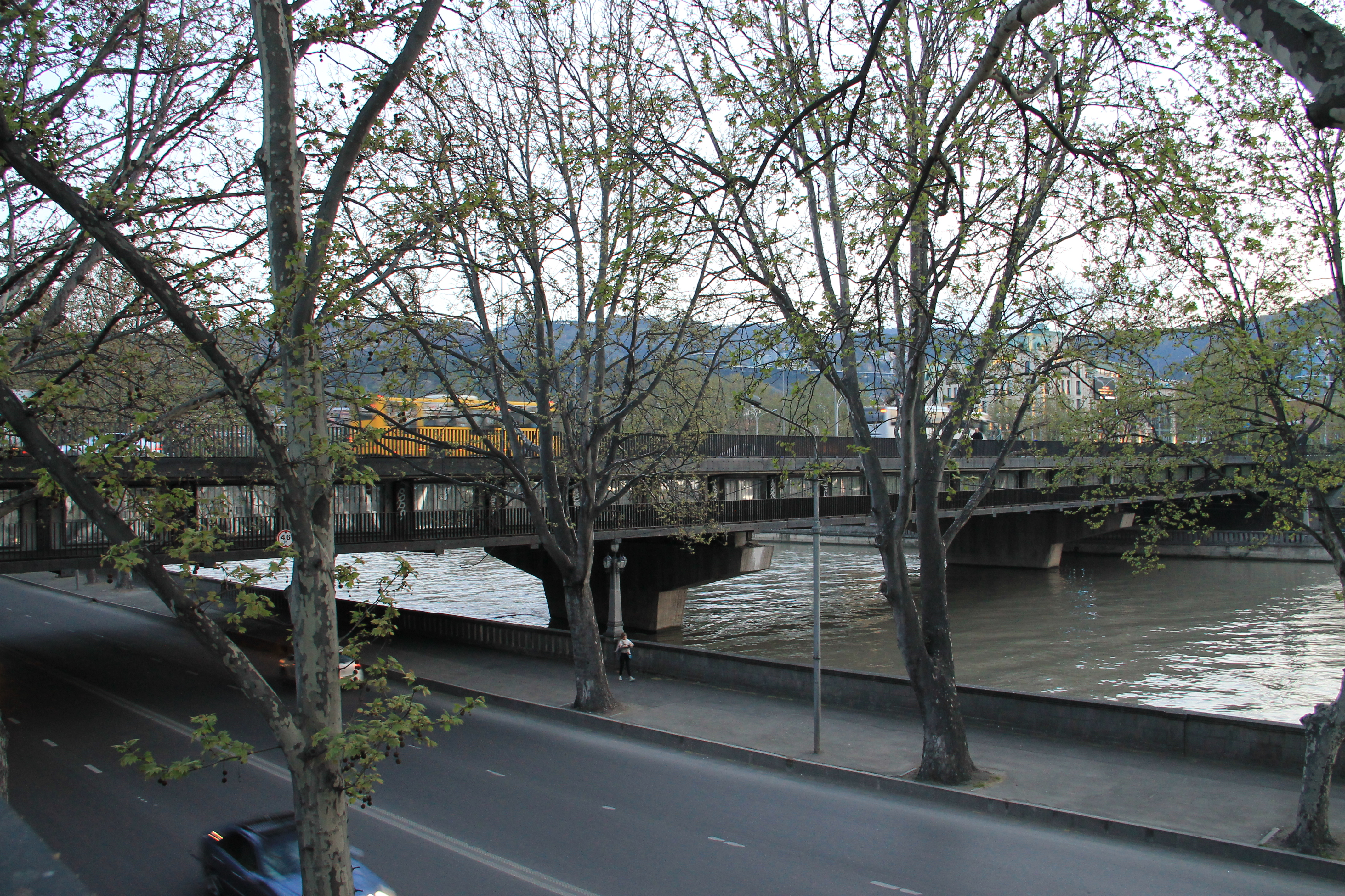 Мост Бараташвили через реку Куру в Тбилиси.